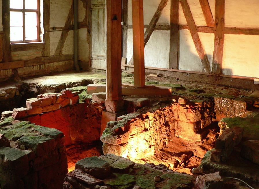 Brennofenfundamente der Fayence-Manufaktur Wrisbergholzen am Tag des offenen Denkmals 2011